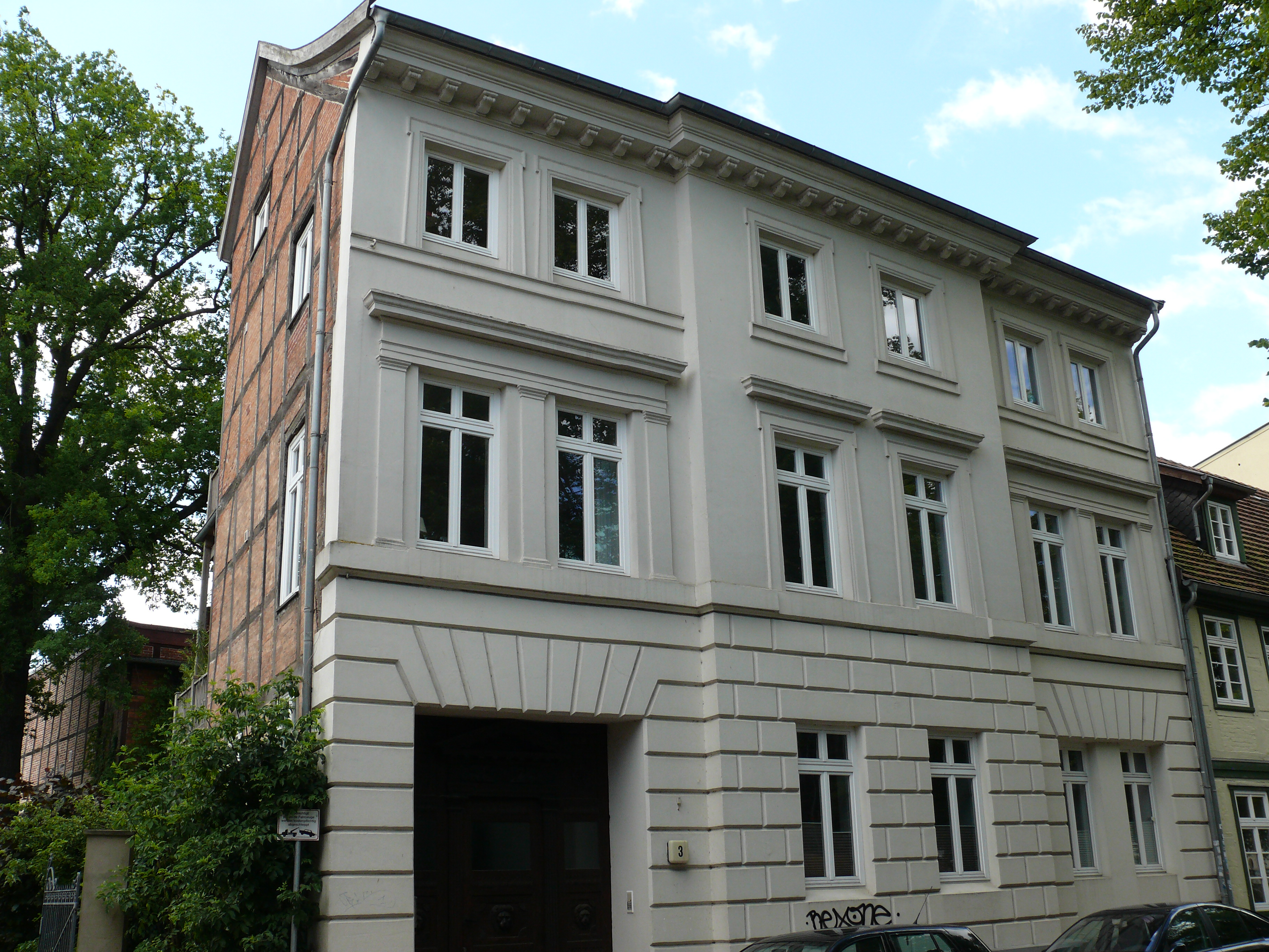 Das Gebäude "Lindenstraße 3" in Schwerin.